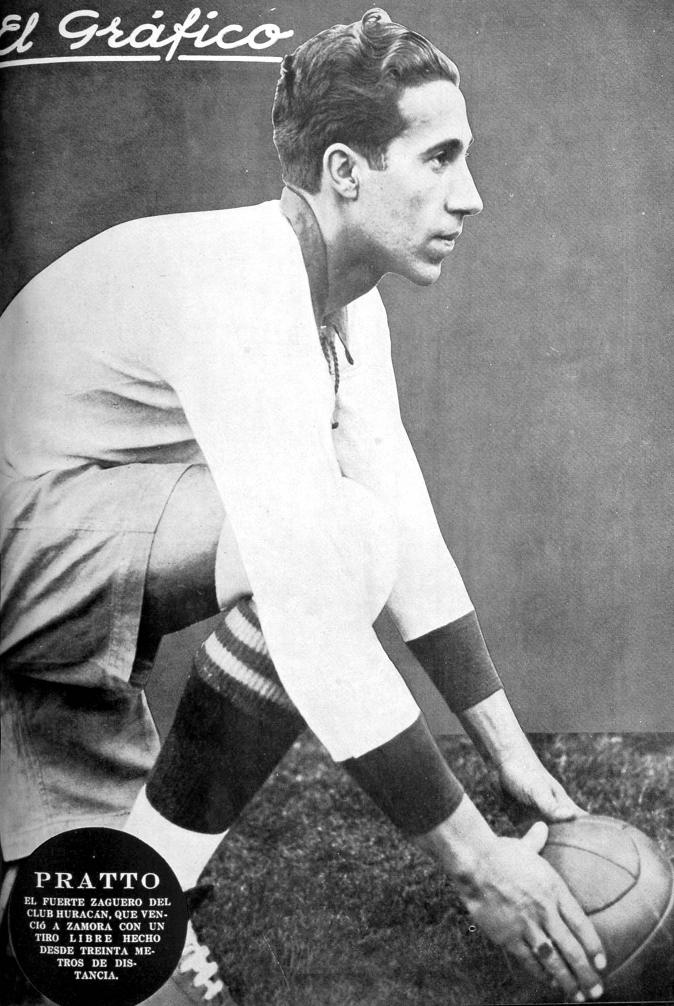 El Grafico del 07 de Agosto de 1926. Edicion 370